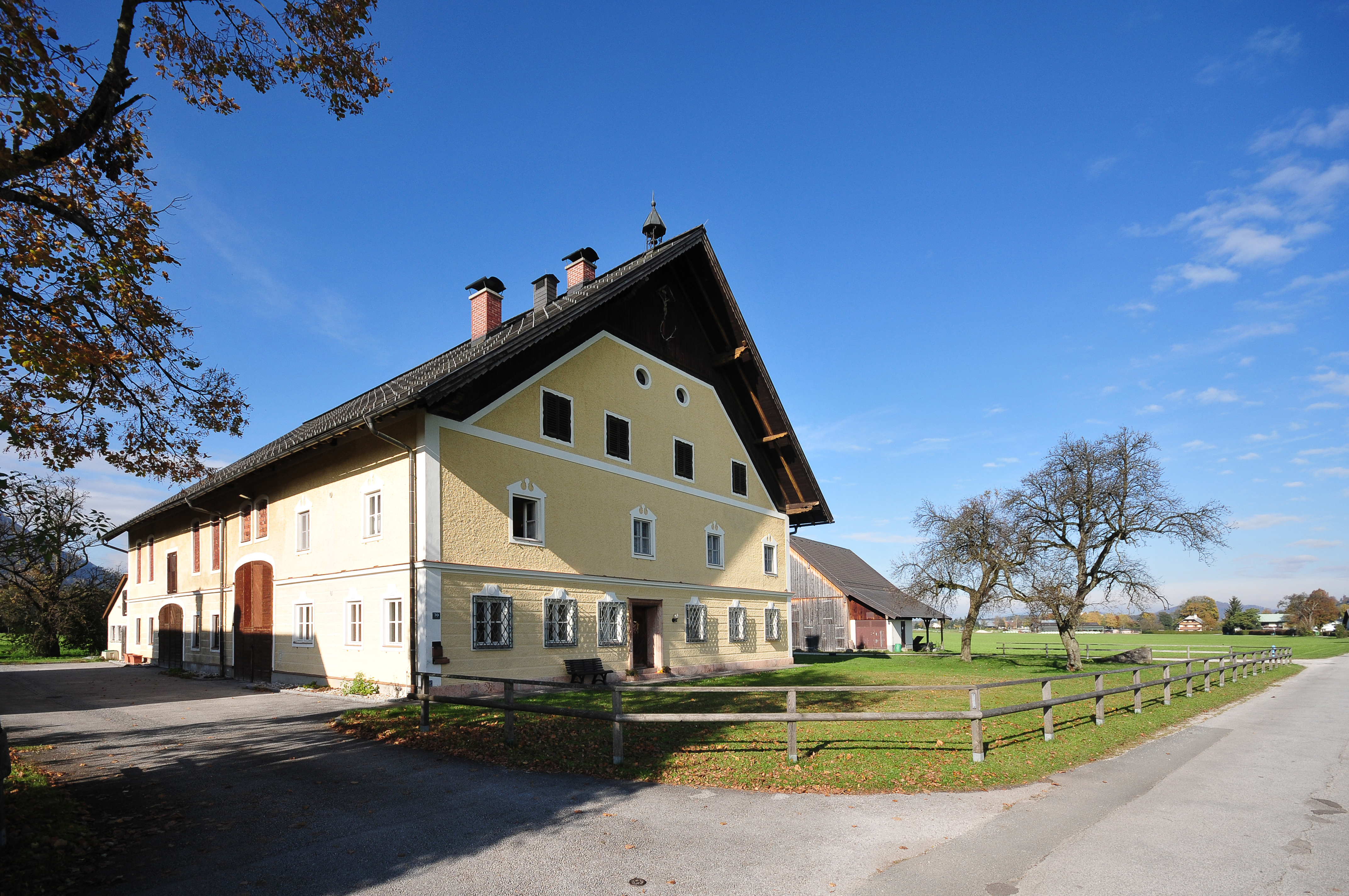 Baudenkmal Bauernhof (Anlage) Fürstenweg 70, Anif, Salzburg Wikipedia im Landtag – Salzburg 31. Oktober 2012 in SalzburgDieses Foto wurde im Rahmen des Projektes „Wikipedia im Landtag“ erstellt.